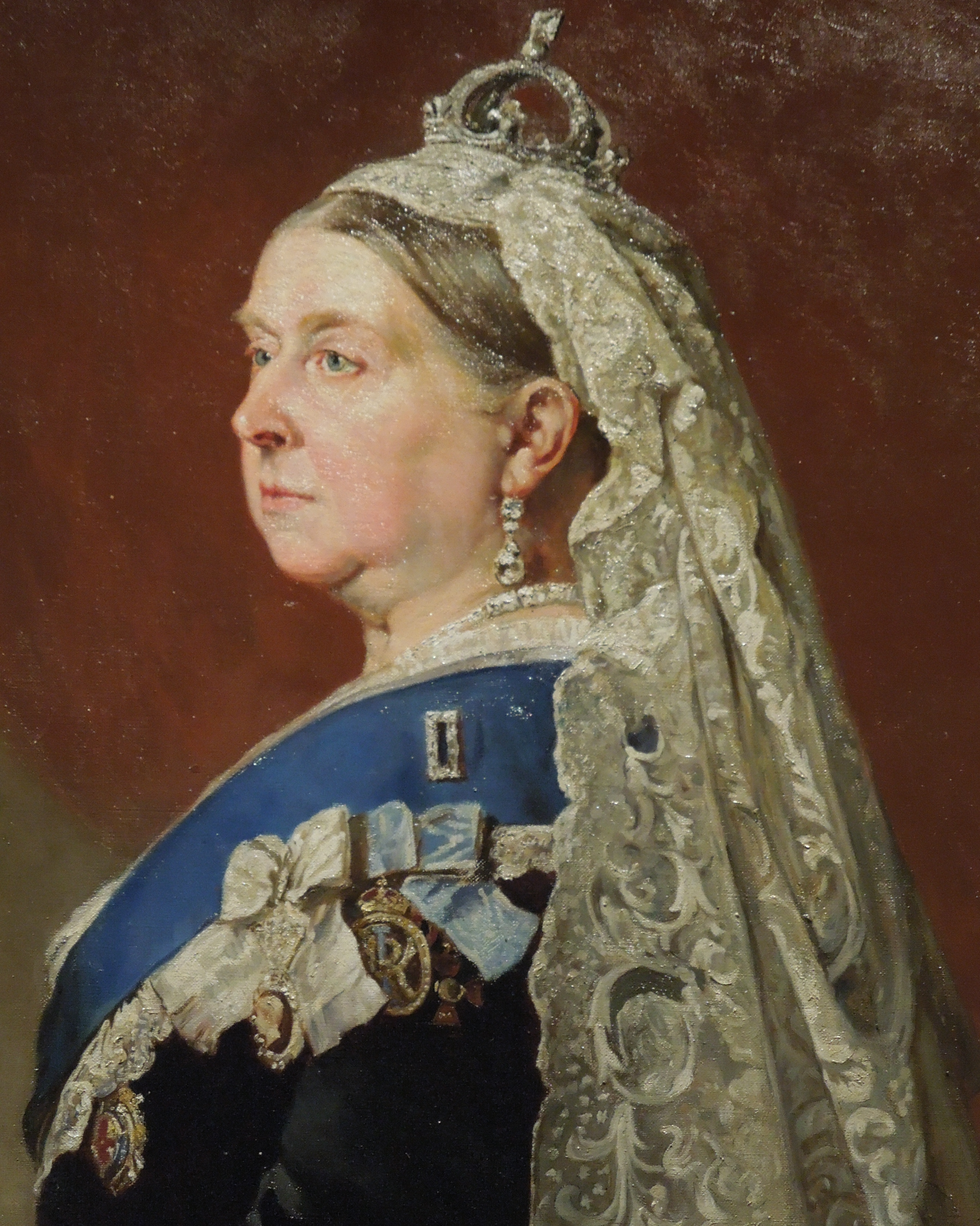 Nice (Alpes-Maritimes, France), sur la promenade des Anglais, la Villa (palais plutôt) Masséna, siège du musée du même nom. La reine Victoria par Heinrich von Angeli en 1885, réplique du portrait de 1885 conservé au château de Windsor, offerte par la reine au président Félix Faure. Détail.